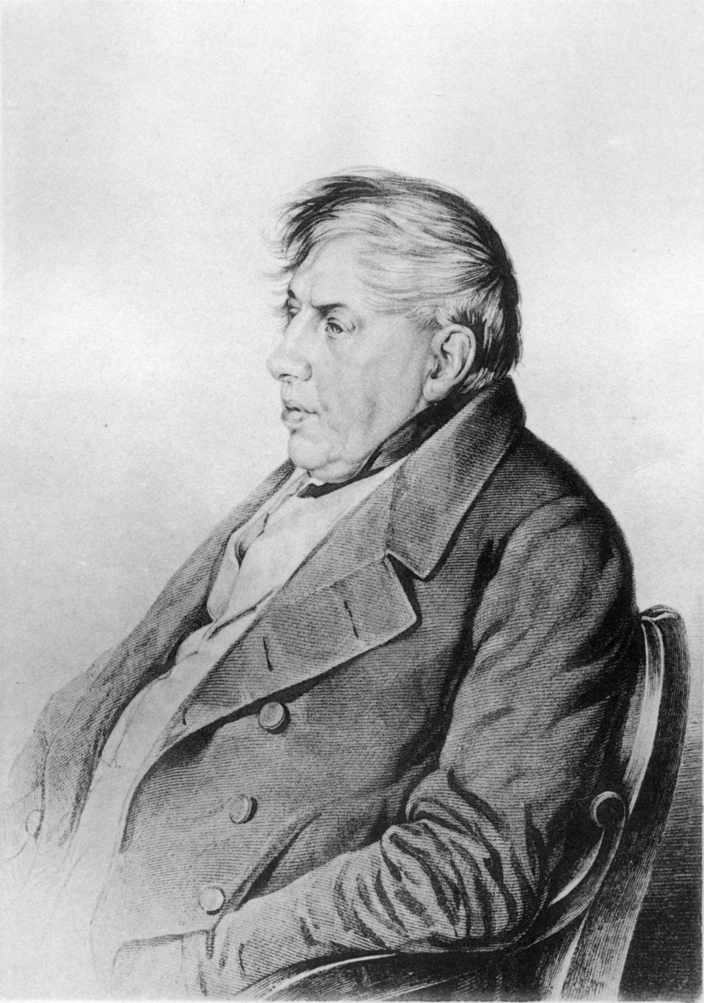 Действительный камергер высочайшего двора, князь Георгий Александрович Грузинский